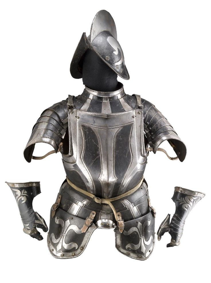 Spanish Conquistador armor